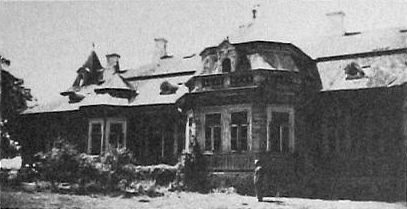 Беларуская (тарашкевіца): Поразаў (Porazaŭ), Багудзенкі (Bahudzienki), сядзіба Бутаўт-Андрайковічаў (Butaŭt-Andrajkovič)